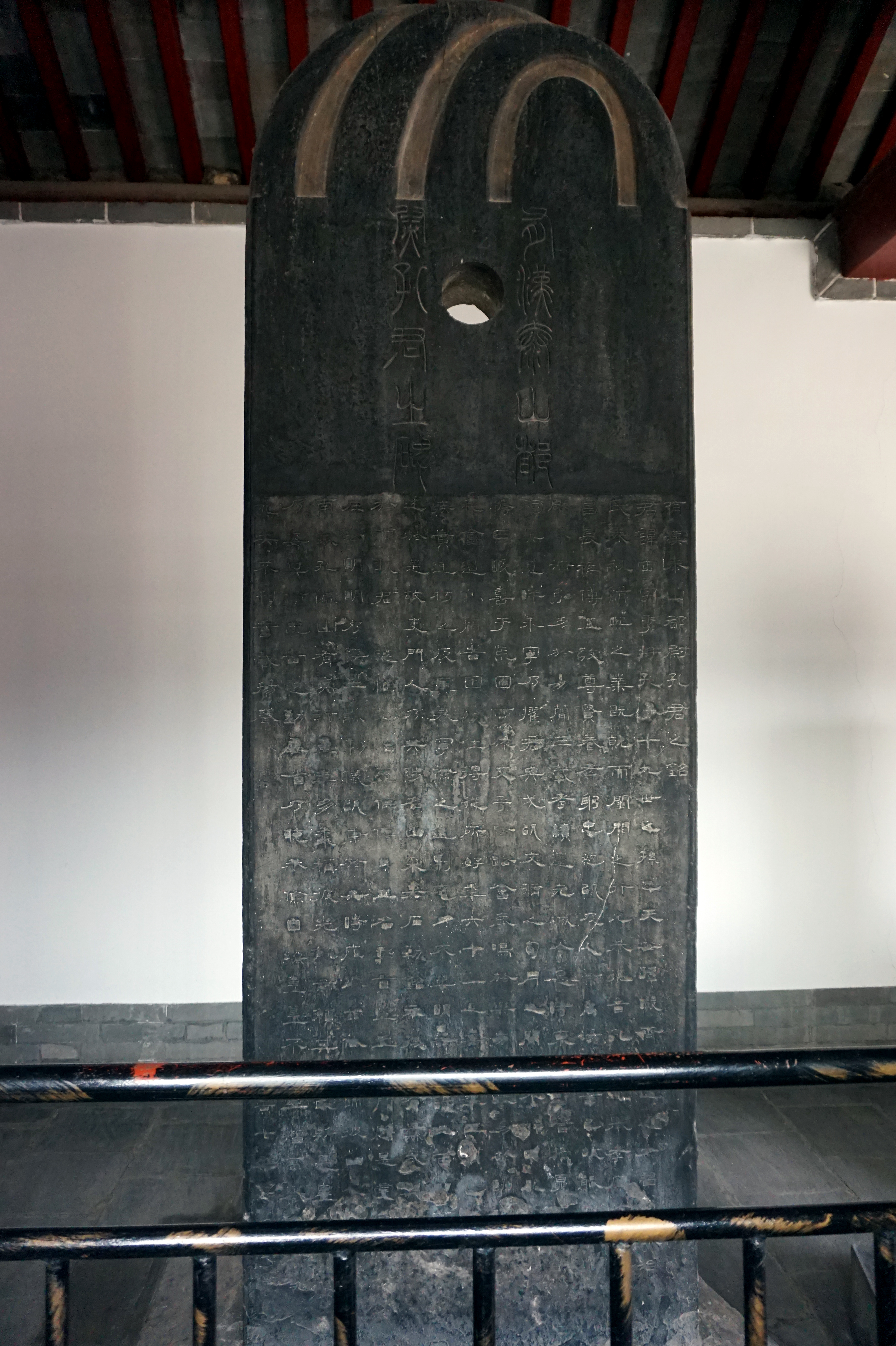 汉孔宙碑。